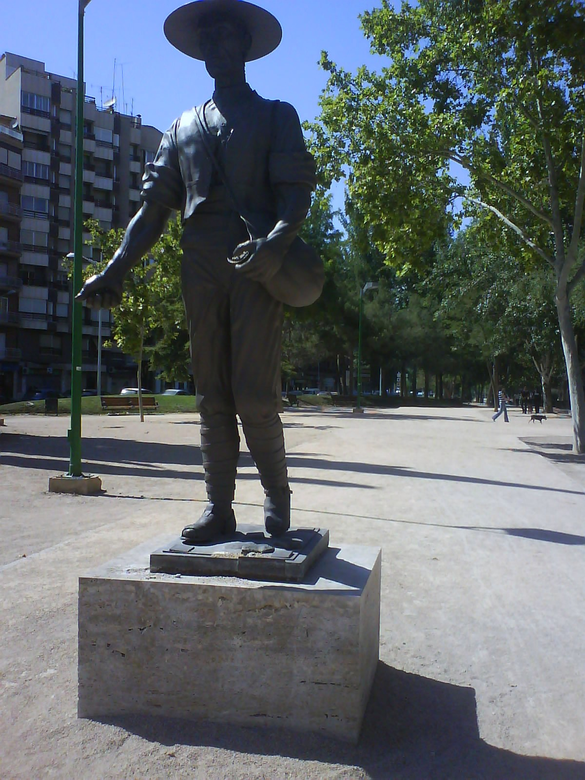 Escultura del Sembrador en el Paseo de la Cuba de Albacete